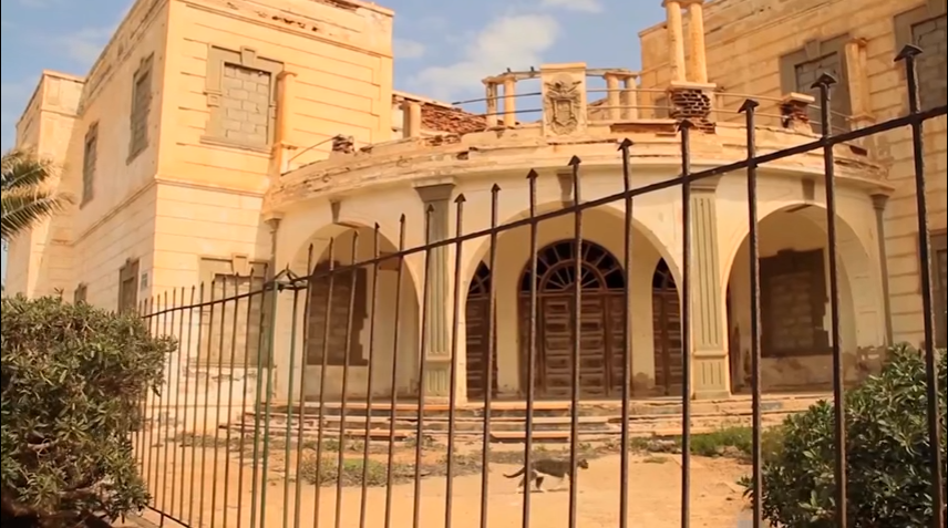 قنصلية الاسبانية بسيدي افني